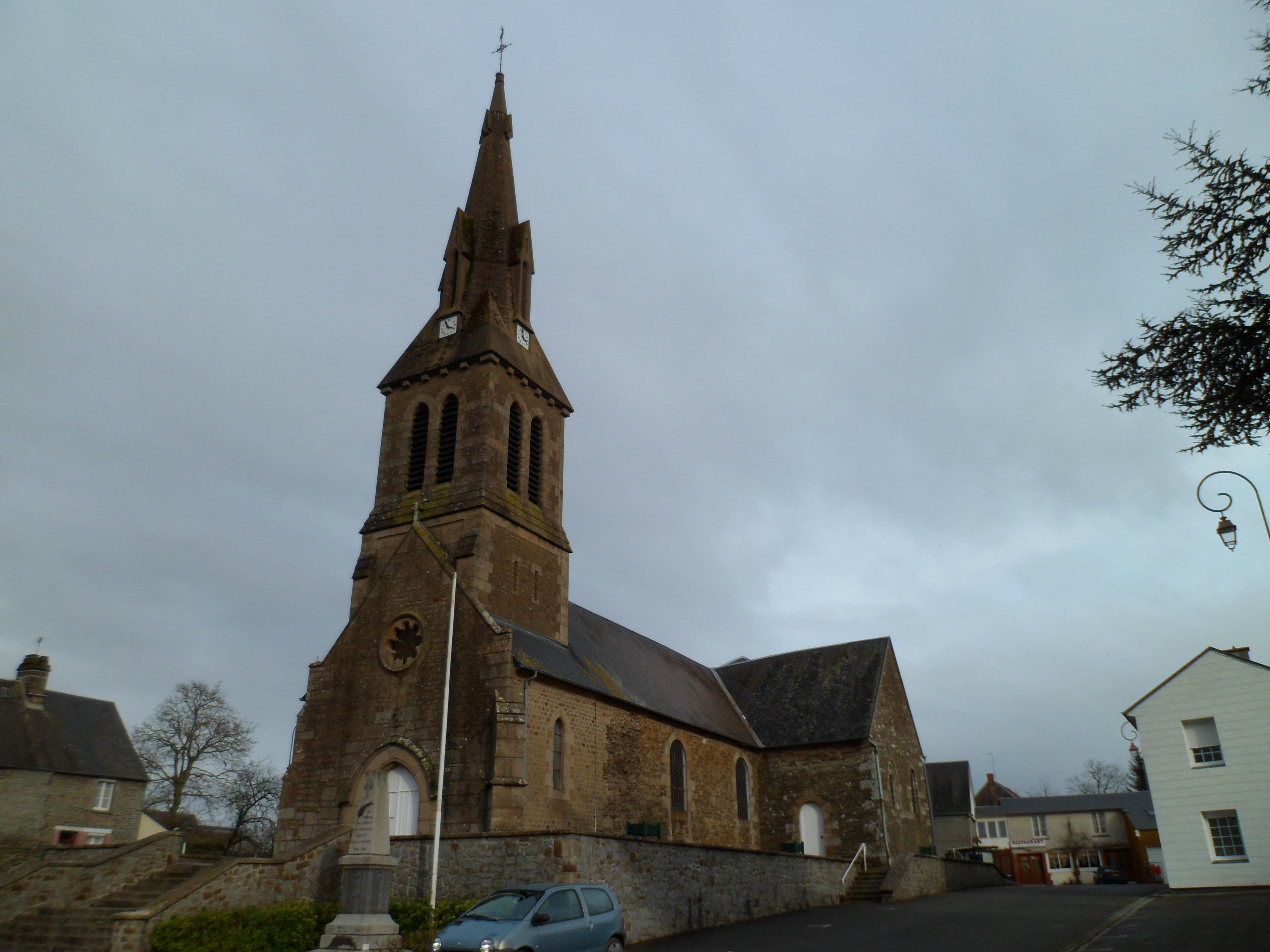 église Saint-Ouen de Lapenty